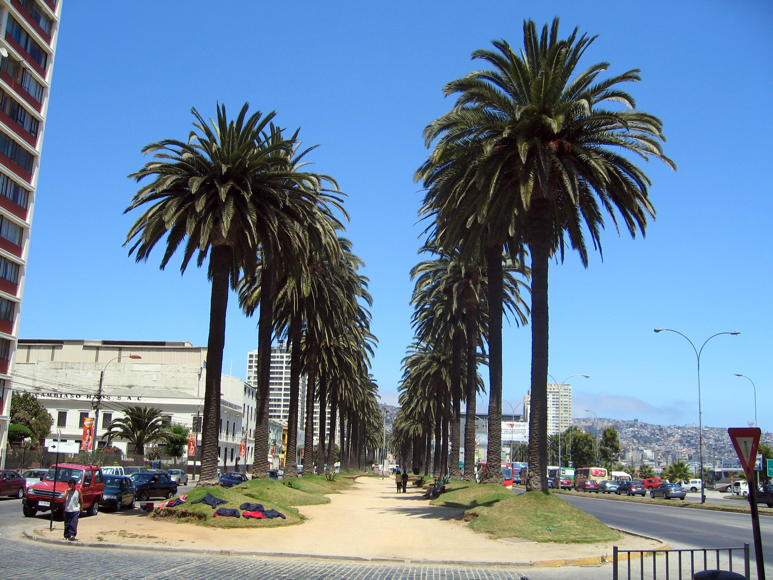 Palmeras de Avenida Brasil, Valparaíso